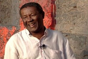 Cantor brasileiro Wilson Moreira em imagem do acervo da TV Brasil.